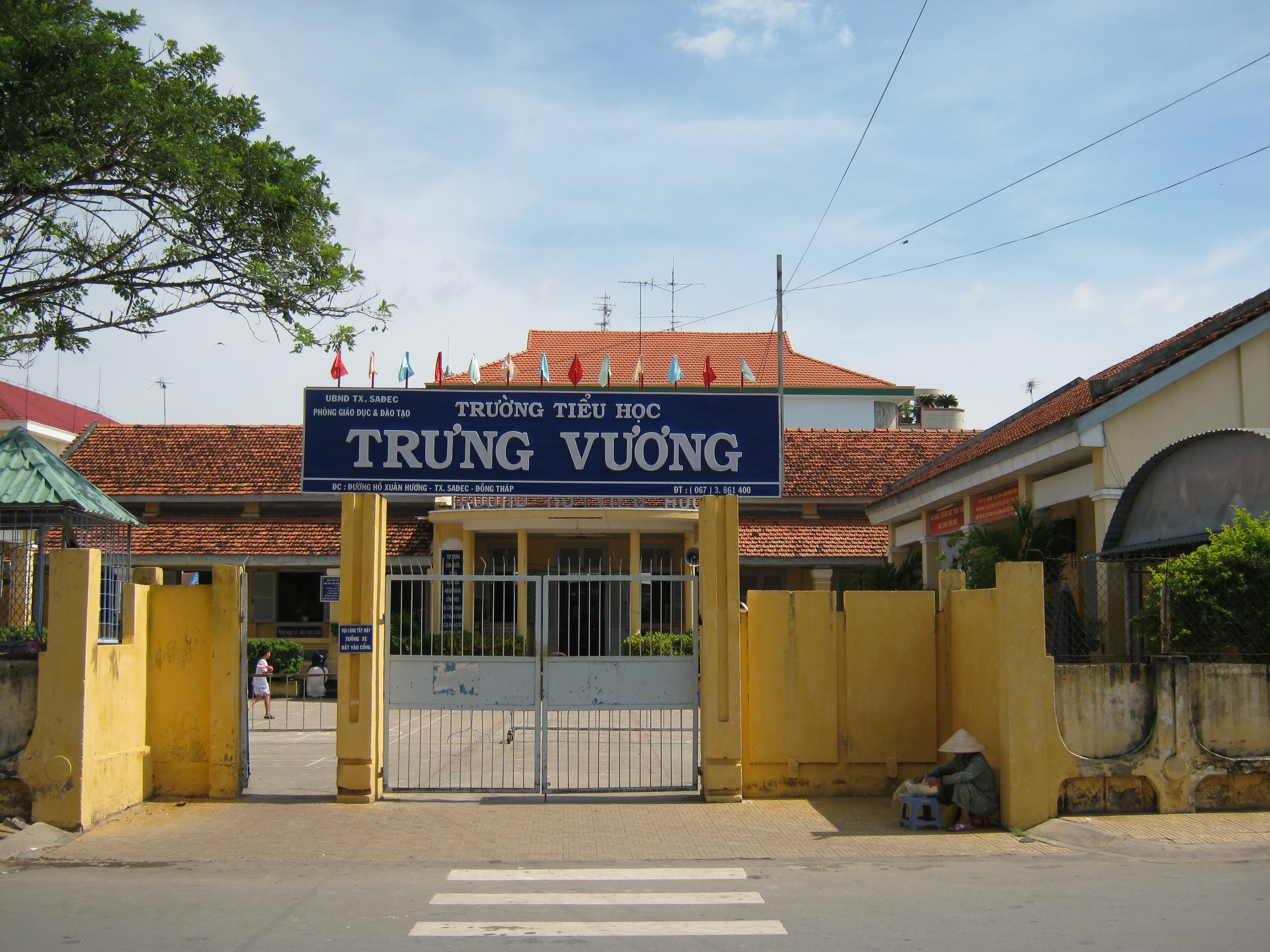 Trường École De jeunes filles tức trường Tiểu học Trưng Vương ngày nay (Sa Đéc, Đồng Tháp, Việt Nam). Nữ sĩ Marguerite Duras (1914-1996), tác giả cuốn tiểu thuyết Người tình (L'Amant), đã từng trải qua một thời thơ trẻ ở đây.